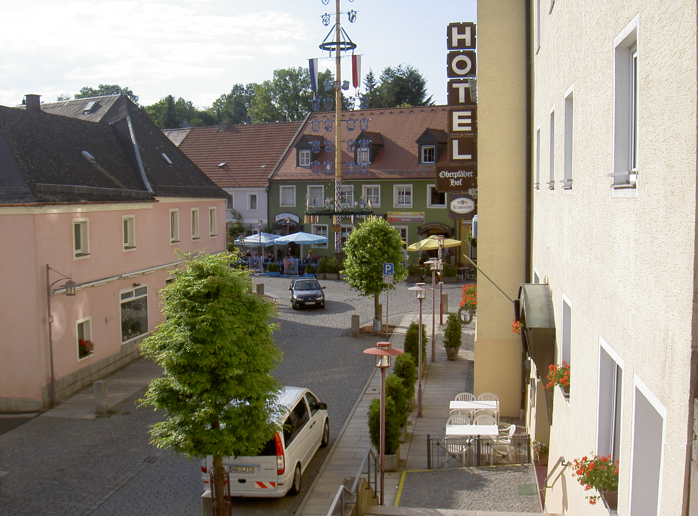 Windischeschenbach, Mündung der Hauptstraße auf den Stadtplatz